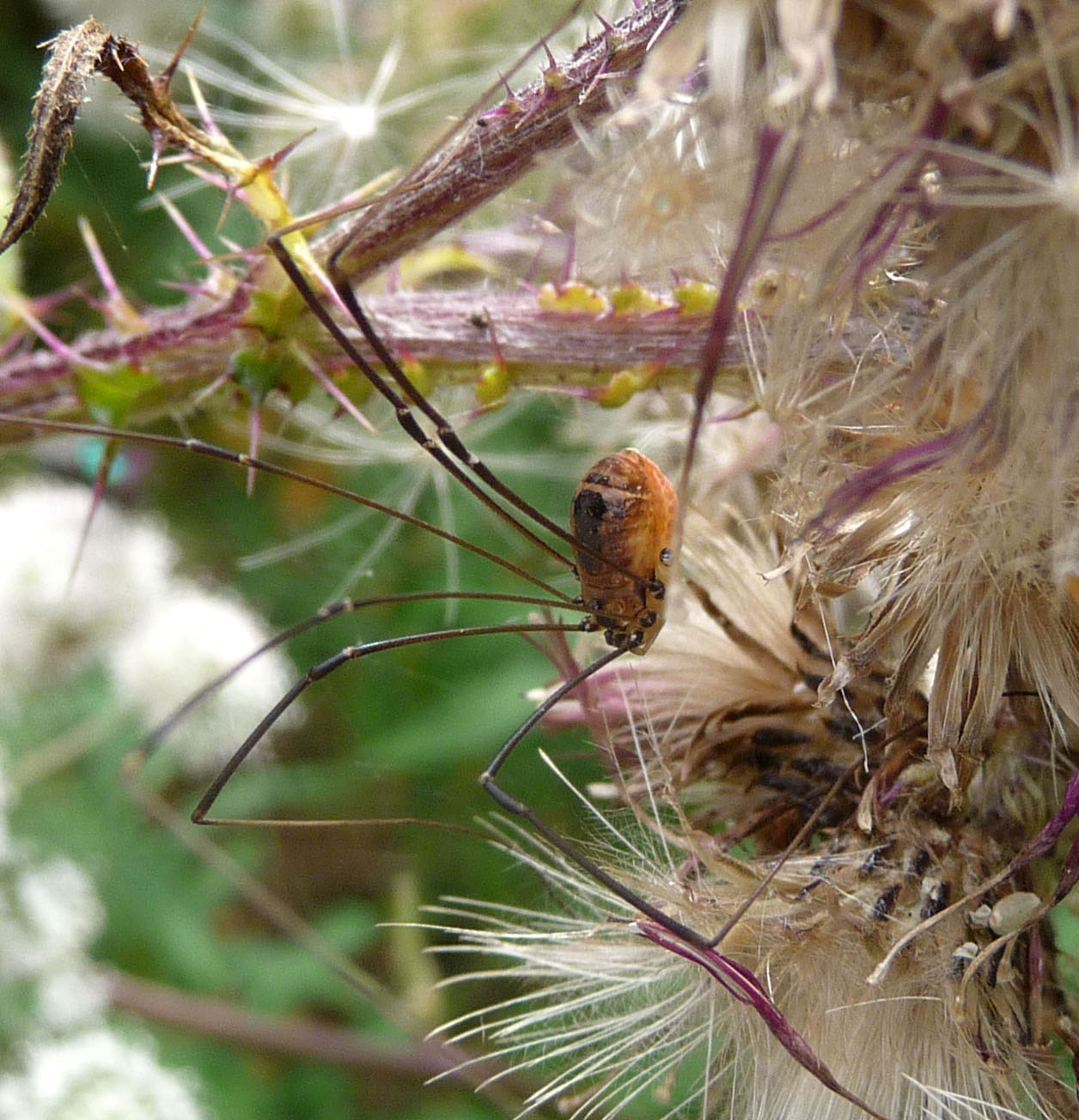 Harvestman.Opilones. Leiobunum rotundum. Female